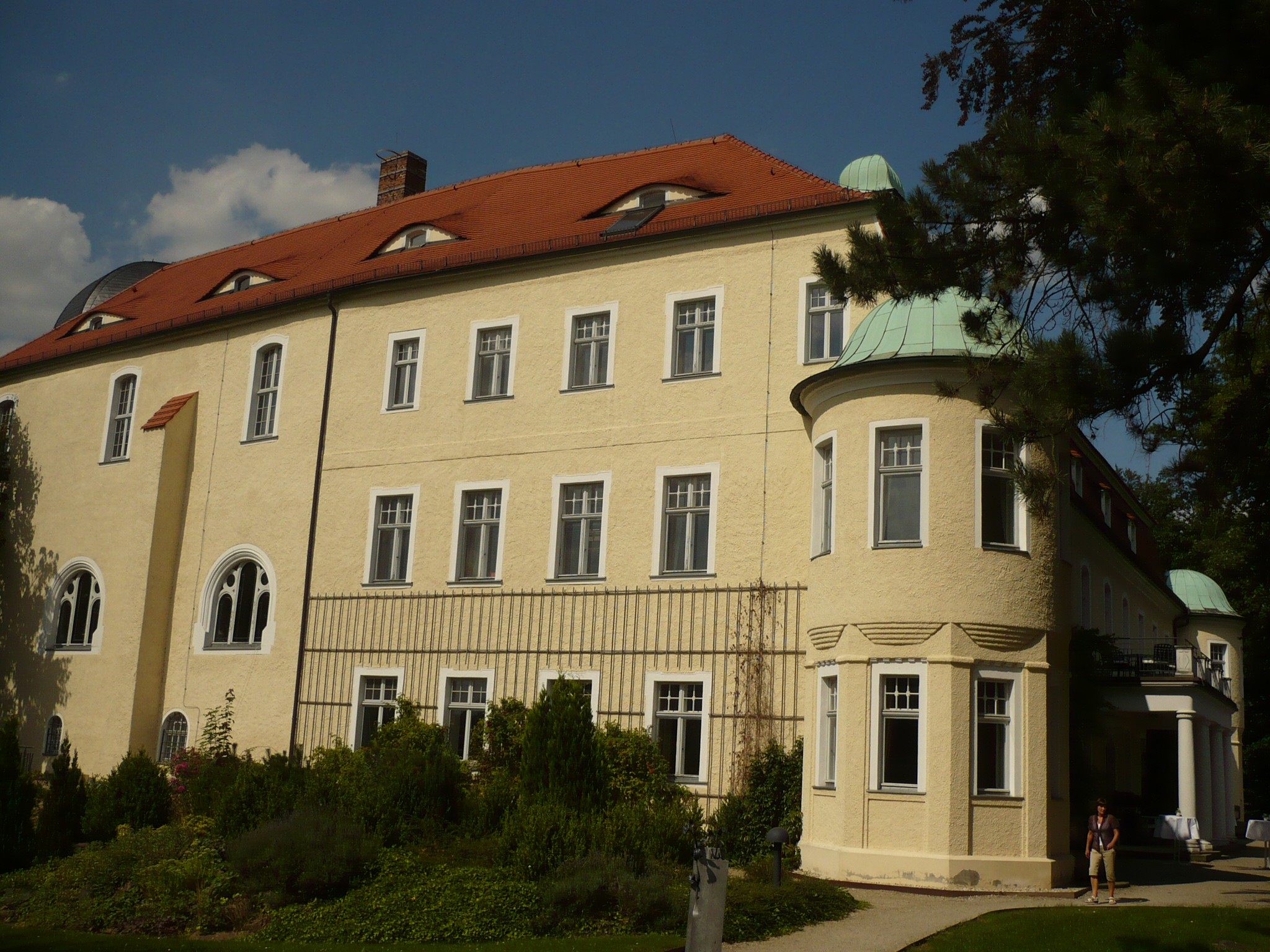 Bok zamku Schweinsburg w Neukirchen Pleiße